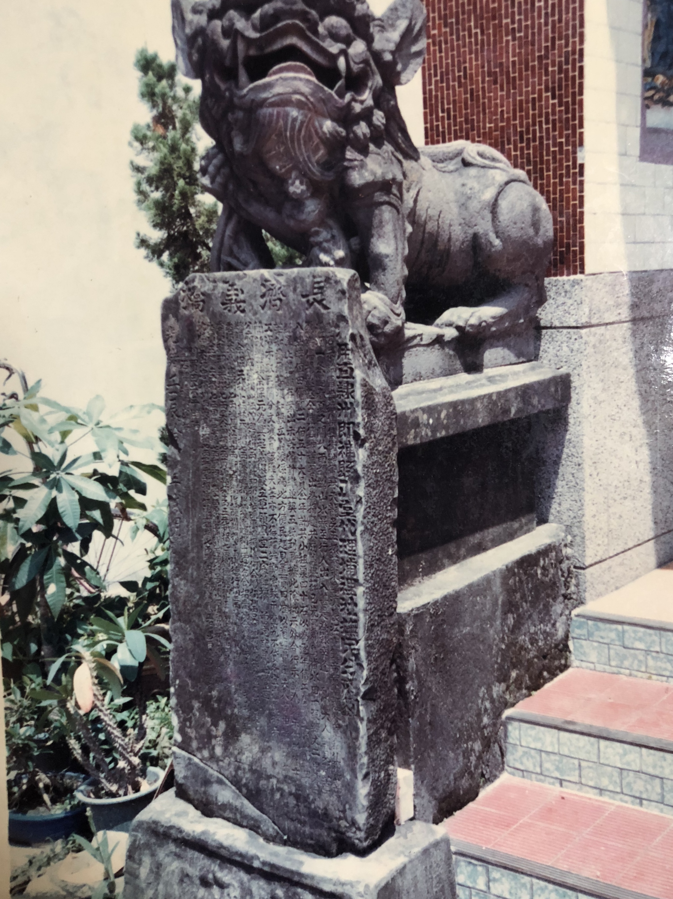 集集廣盛宮門前左側石獅以及古石碑(921大地震前)